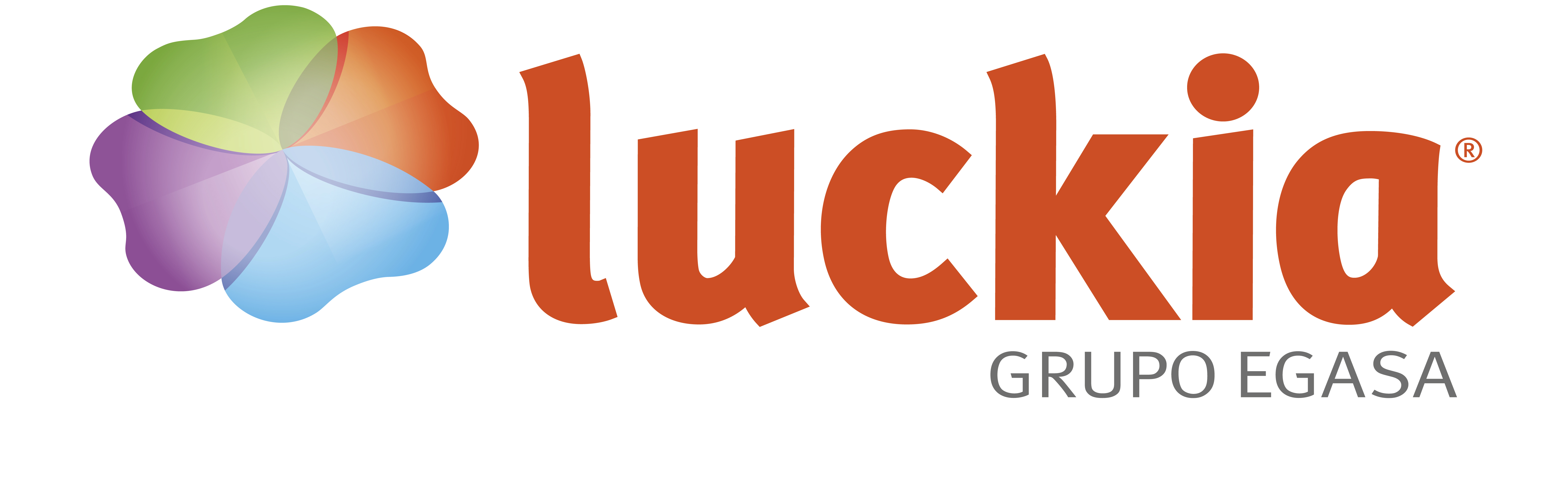 luckia es la marca de EGASA que nace para unificar todas las operaciones del grupo.